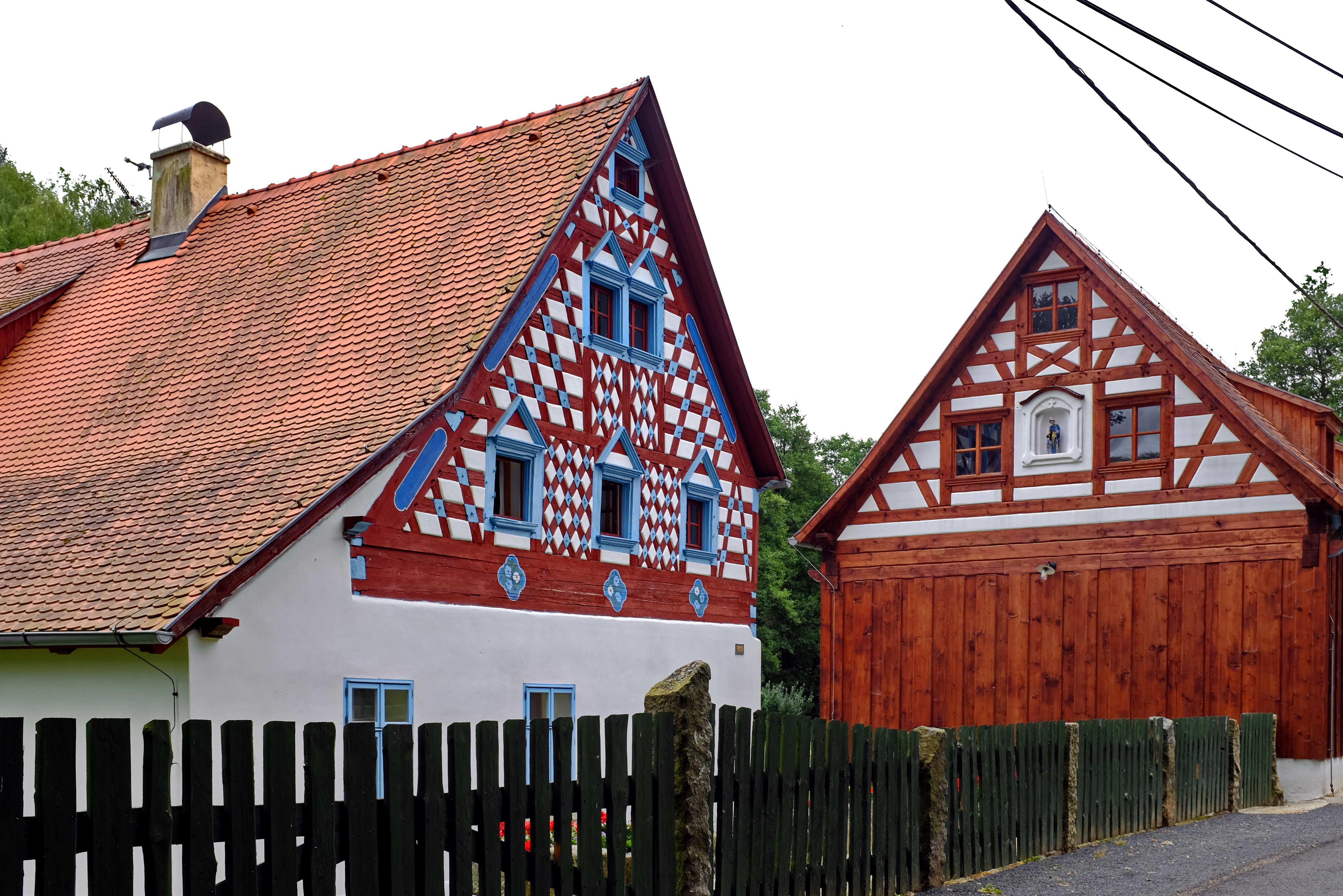 Usedlost čp. 12, Salajna 12, Salajna.